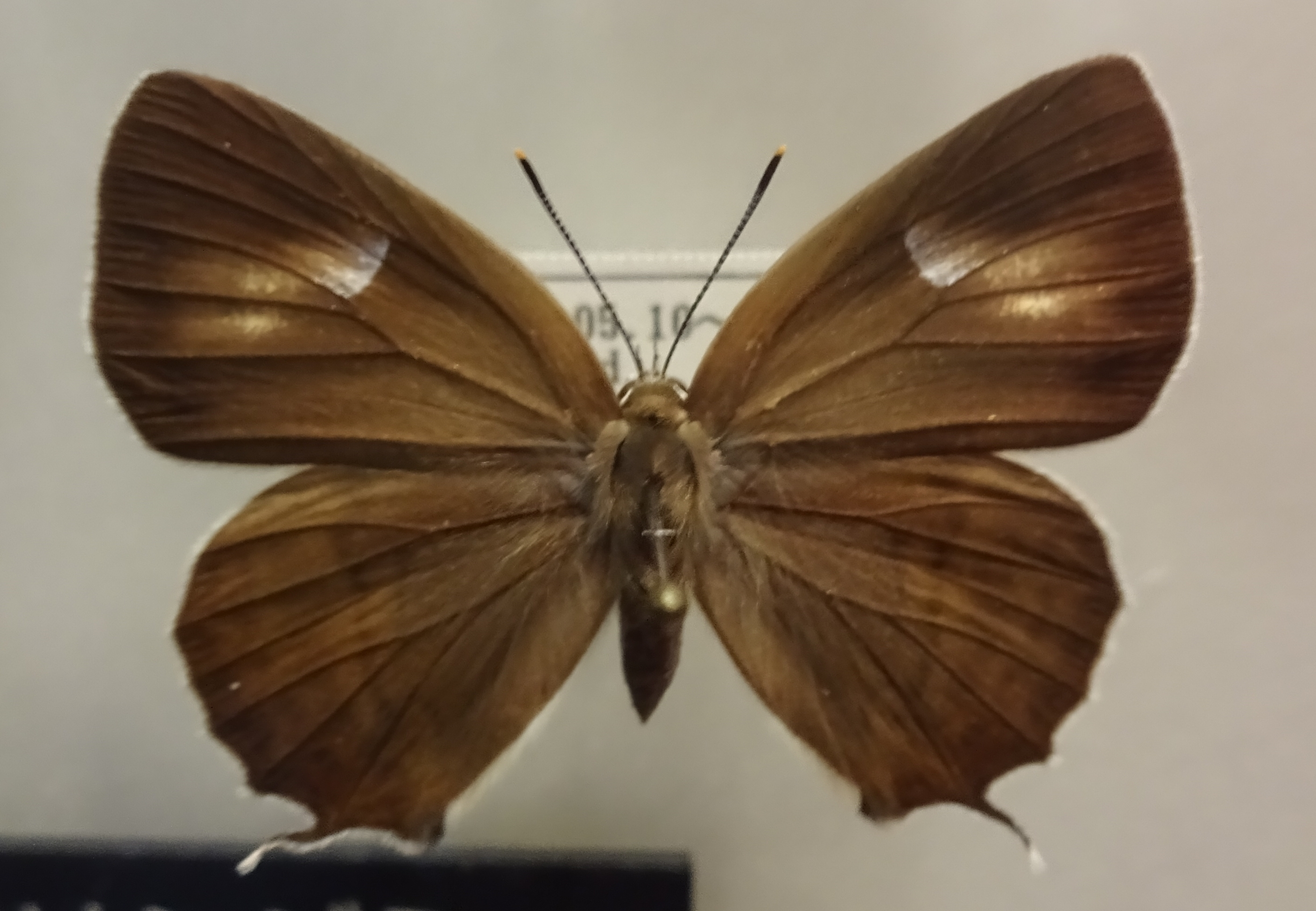 ウラジロミドリシジミ